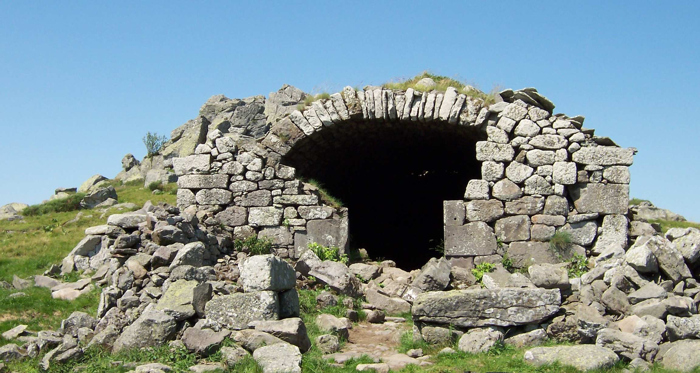 Ruines d'un buron à Cabrespine (Cantal)